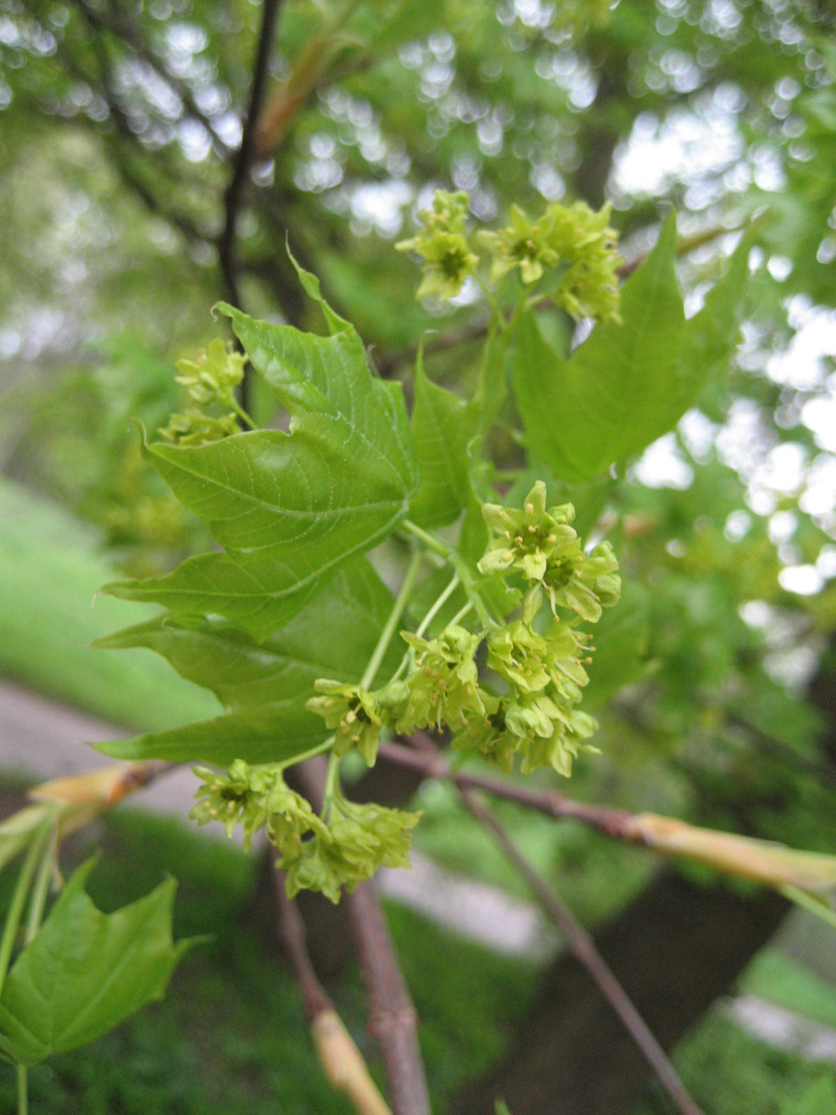 Acer mono - Blüte - Im Bot. Garten Berlin Dahlem